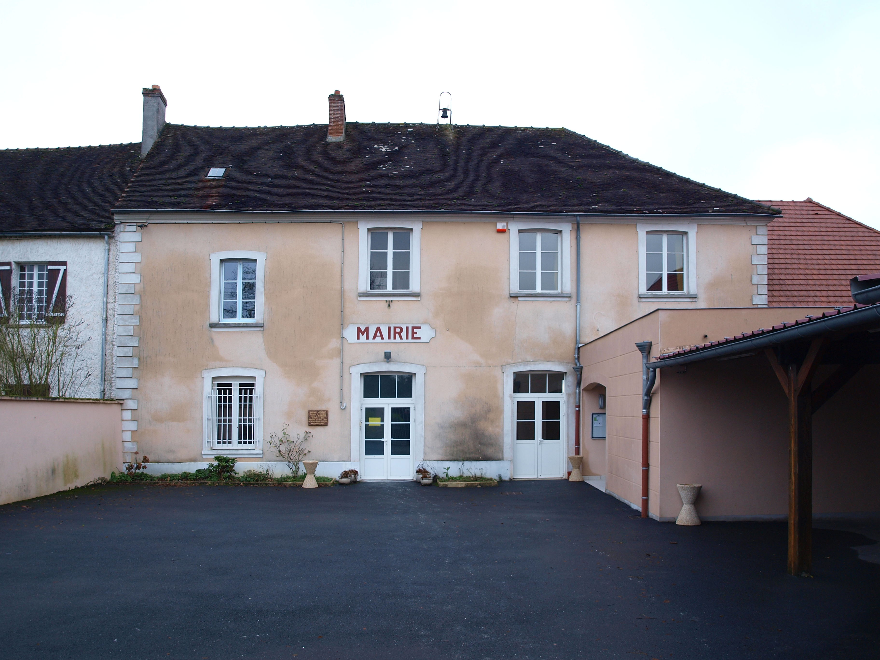 Marchais-en-Brie (Aisne, France) ; mairie